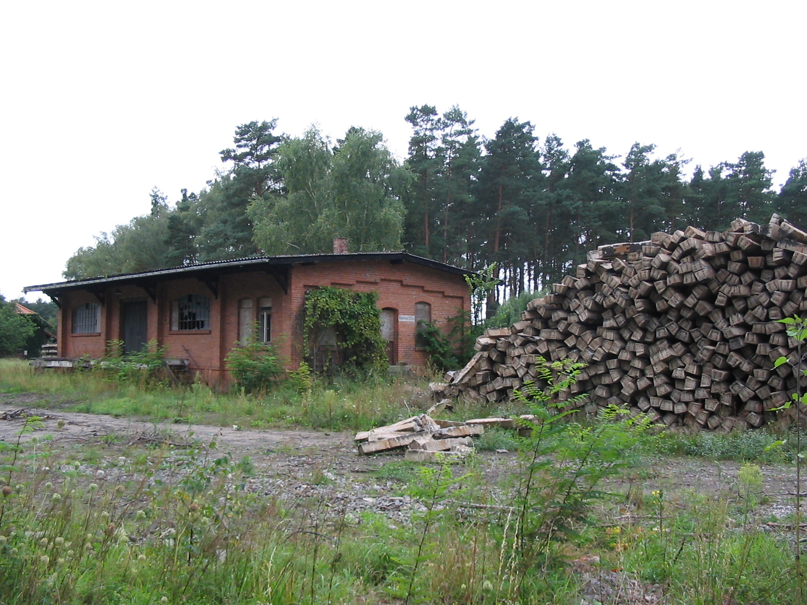 ehemalige Bahnmeisterei in Malliß an der demontierten Bahnstrecke Ludwigslust–Dömitz